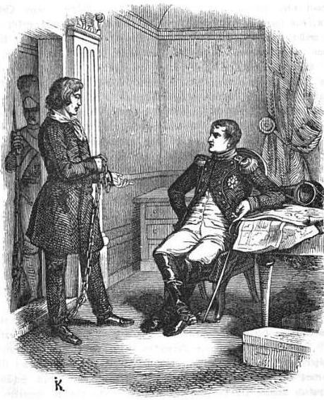 Interrogatoire de Staps par Napoléon.